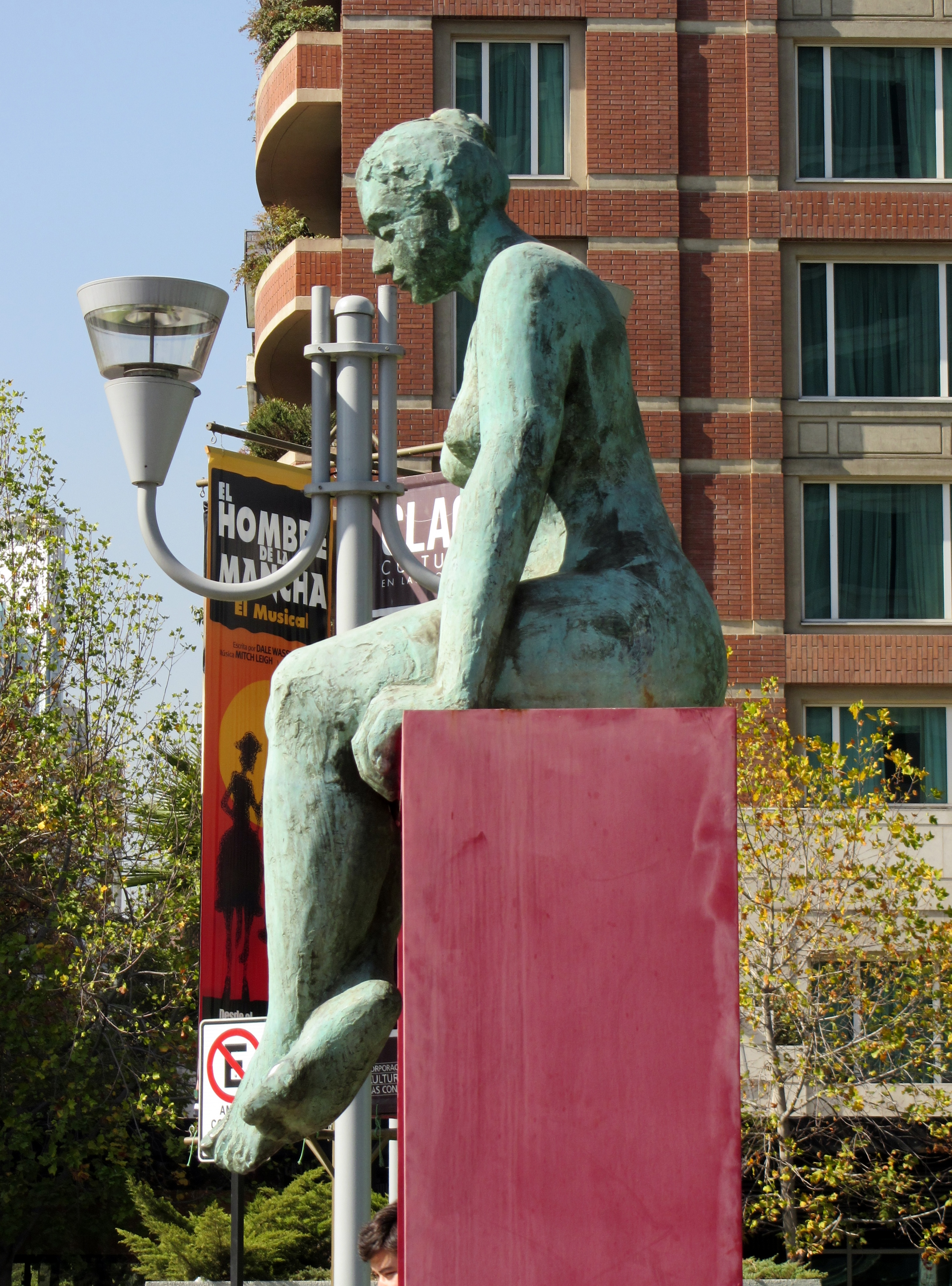 La pensadora, de Francisca Cerda, en el Paseo de las Esculturas La Pastora, en el acceso norte (en dirección a avenida Apoquindo) del Centro Cívico de Las Condes.